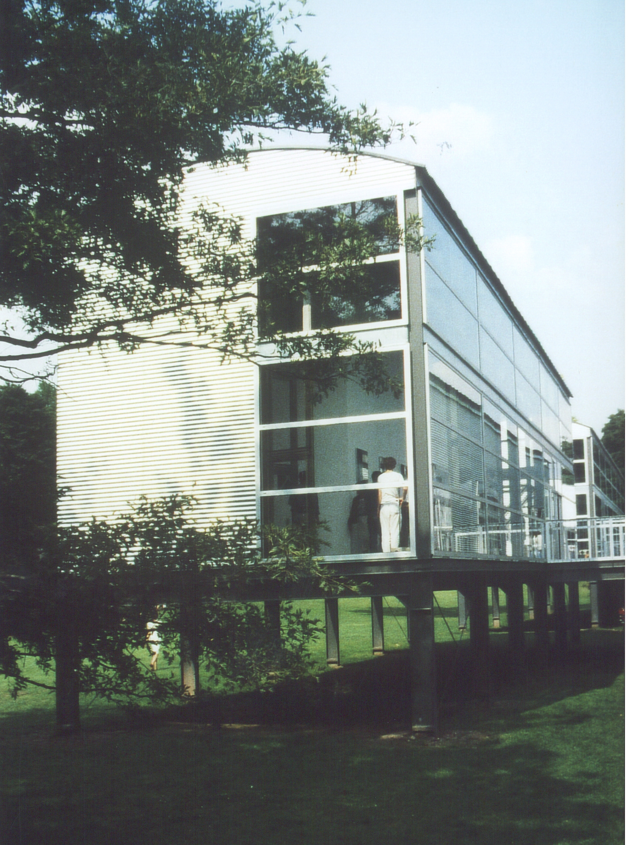 documenta IX Temporäre Bauten I 1992